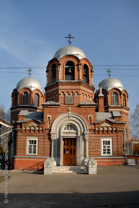 Петропавловская церковь в Томске